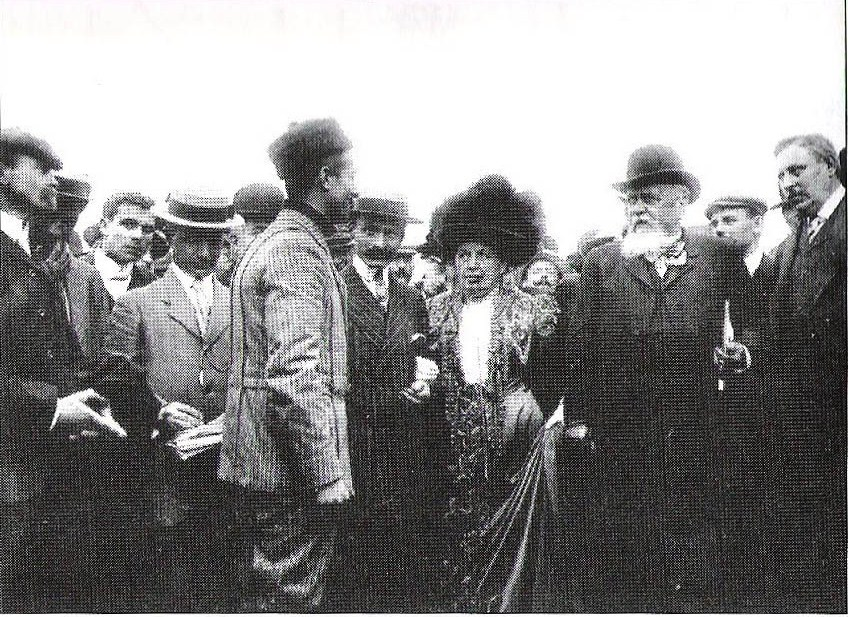 Louis_Paulhan, madame, tenant le bras du marquis de Polignac_et_monsieur le_président_de_la_République 24_août 1909 .